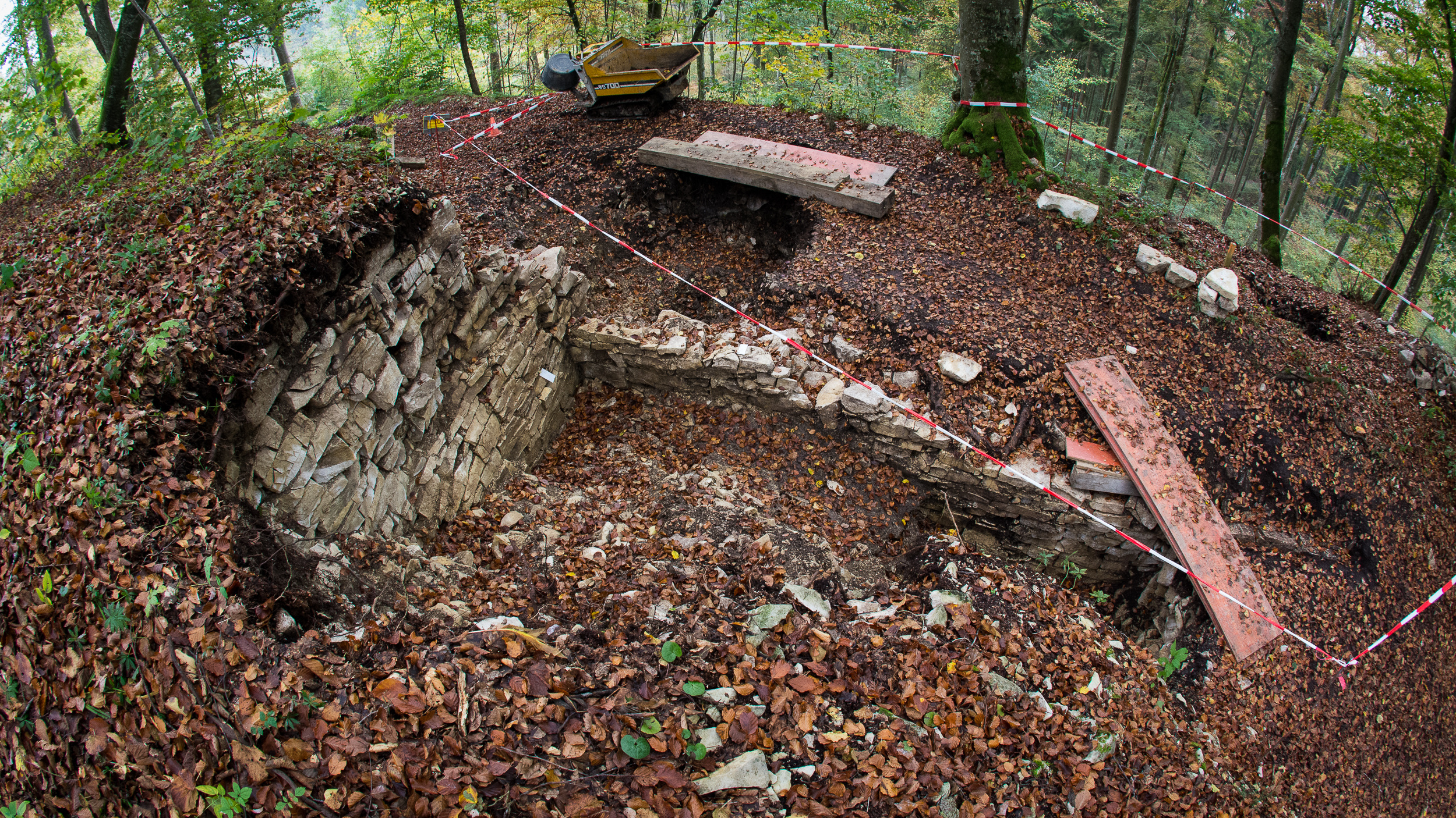 Keltische Trockenmauern auf dem Burgberg der Burg Emerfeld ("Alte Burg") bei Langenenslingen.